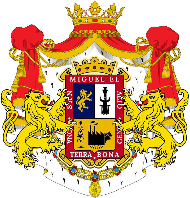 Blasón de la Ciudad de San Miguel el Alto, capital del municipio del mismo nombre.